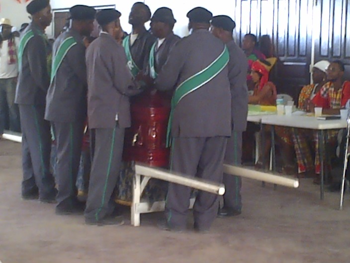 Dit is een demonstratie van het werk van de dragers bij de begrafenis bij de creolen in Suriname